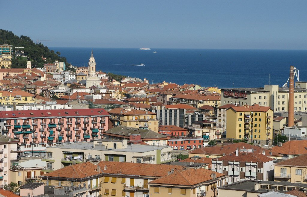 Oneglia, Imperia (Italy)